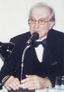 رفعت الجادرجي، معماري وفنان تشكيلي عراقي ولد في 1926.